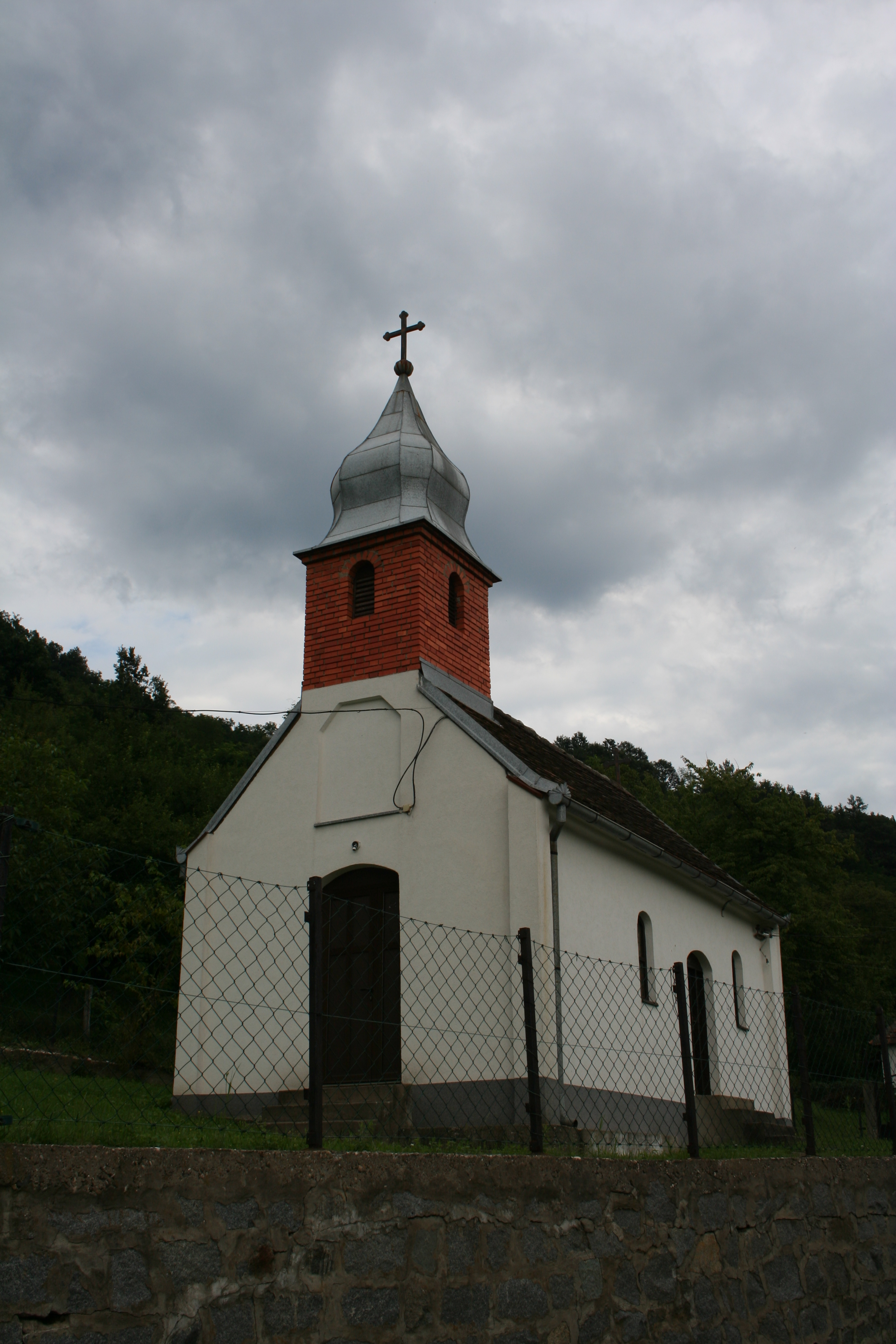 Crkva Sv. Trojice, Voljevci